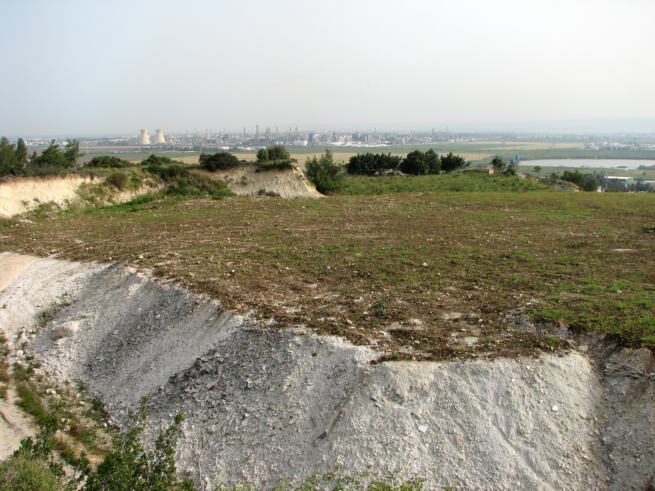 Nesher Old Quarry belongs to "Nesher Israel Cement Enterprise". Was opened on 1925 and closed on 1942. The quarry was reconstructed. Now in the city Nesher המחצבה הישנה של נשר מפעלי מלט ישראליים נפתחה בשנת 1925 ונסגרה בשנת 1942 לאחר שמקורות אבן הסיד התדלדלו. המחצבה עברה שיקום המשך השנים. בטח המחצבה מספר בארות ששימשו את בית החרושת ואת היישוב נשר בשנותיו הראשונות